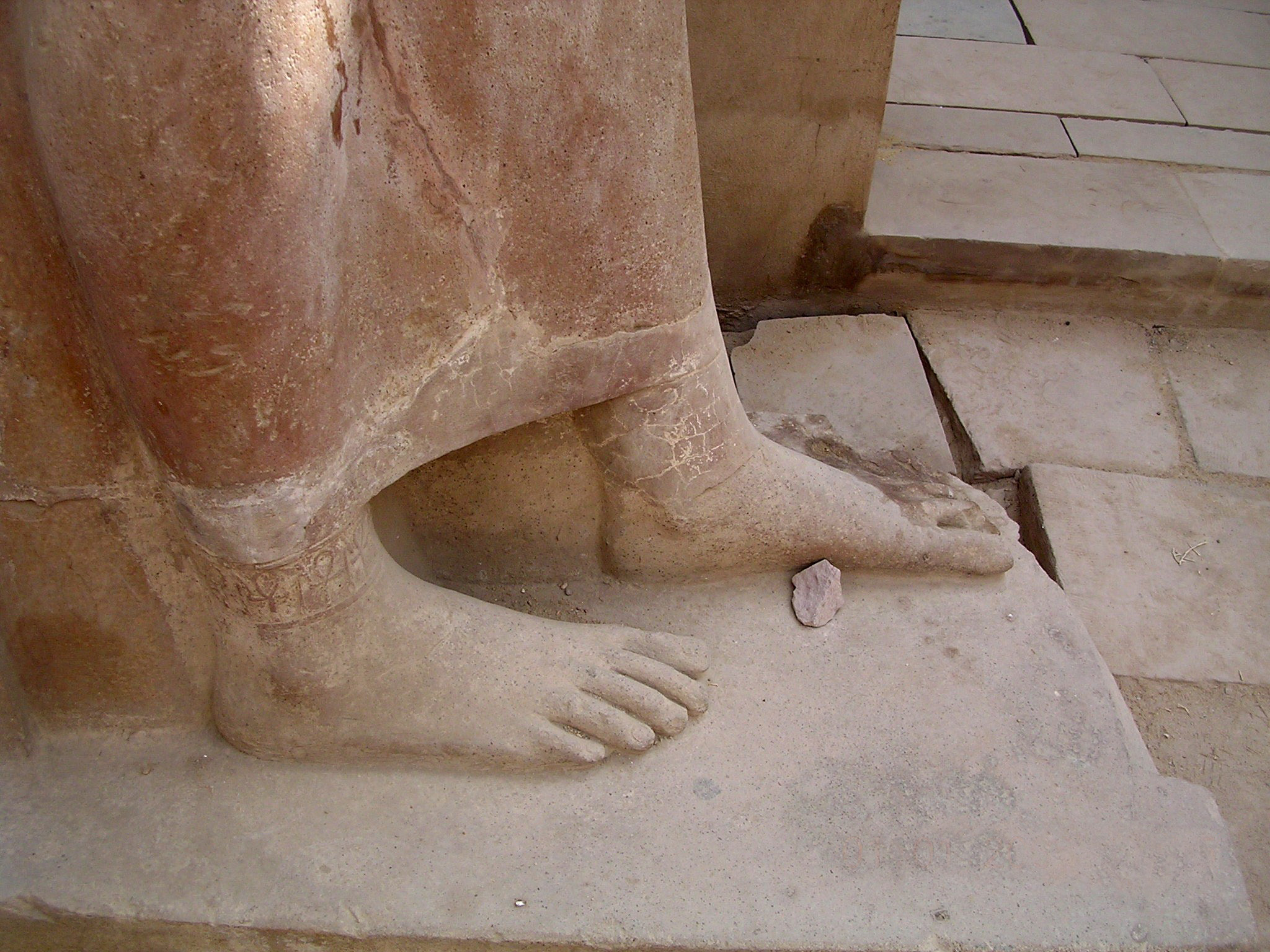 Autore:Amaunet - Fonte:lavoro proprio - Data 2008 - Descrizione: Statua della dea Amonet, a Luxor, con particolare dei piedi.